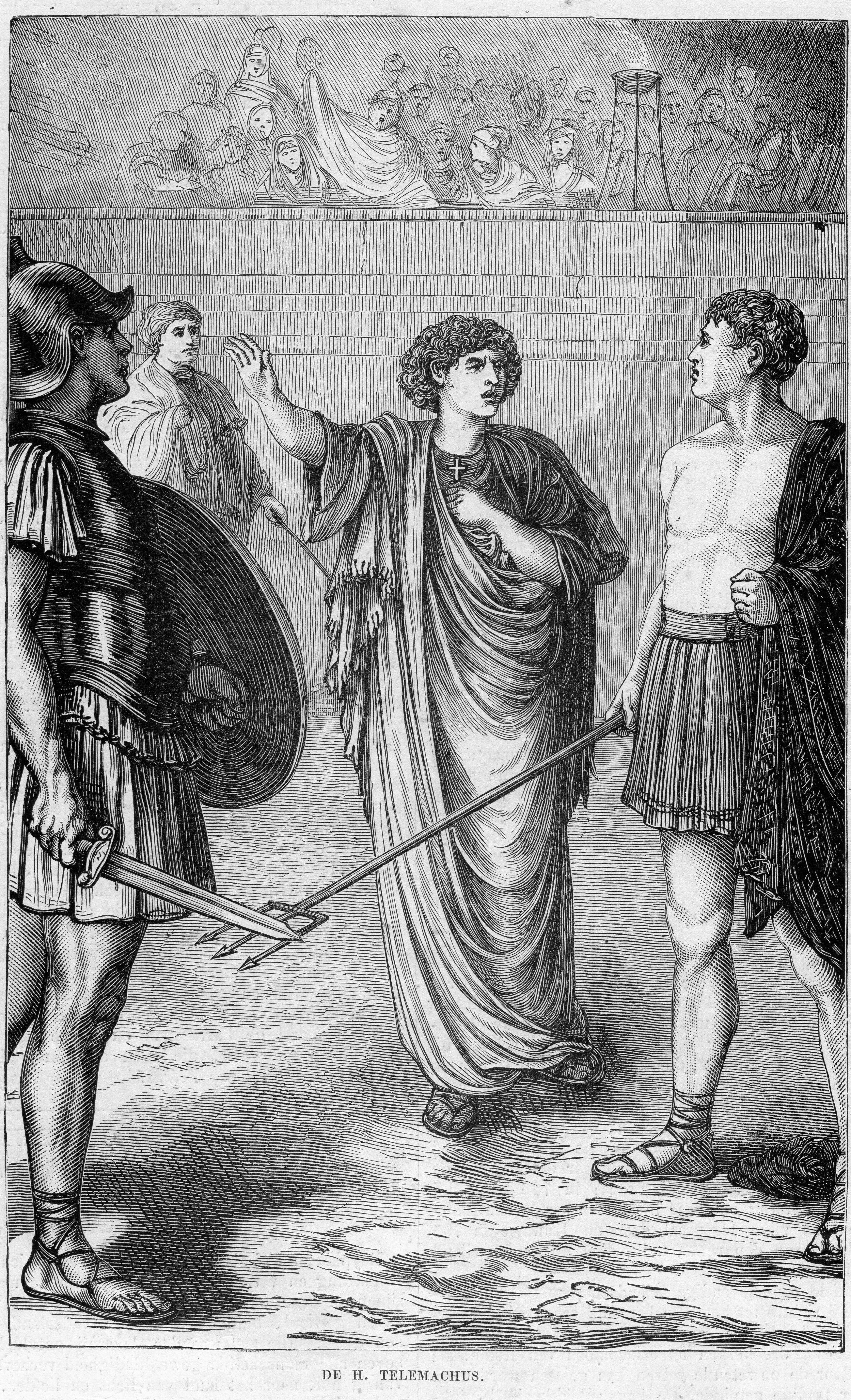 Kath. Illustratie 1869-1870 nr 26 p.204 gravure De H. Telemachus